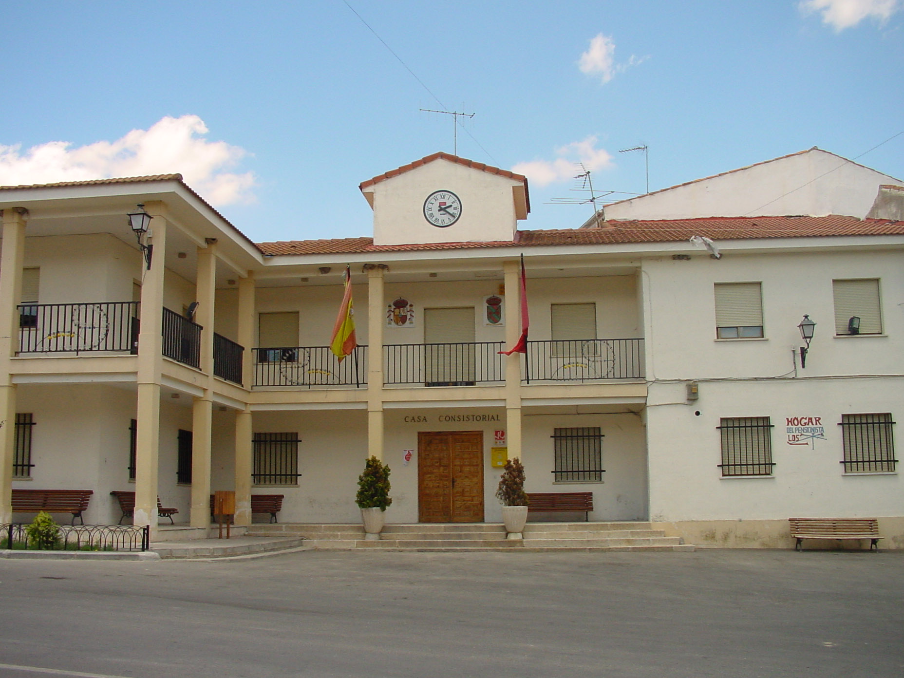 Ayuntamiento de Brea de Tajo.